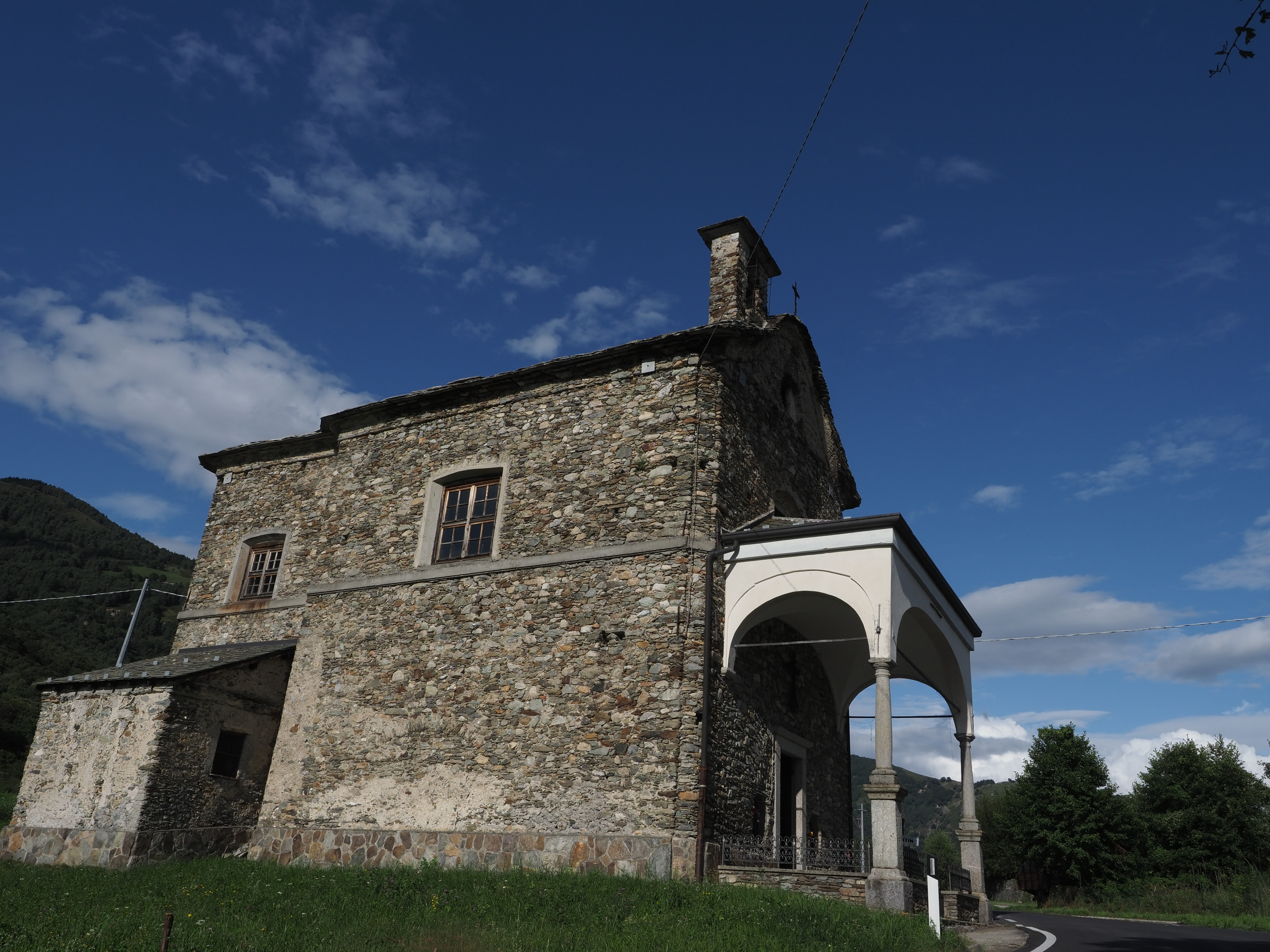 chiesa della Natività della Beata Vergine This is a photo of a monument which is part of cultural heritage of Italy.